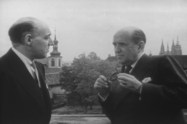 Laurence Adolph Steinhardt, velvyslanec Spojených států Amerických v Československu a Jan Masaryk (bývali blízcí přátelé), záběr z amerického filmového týdeníku "The March of Time".